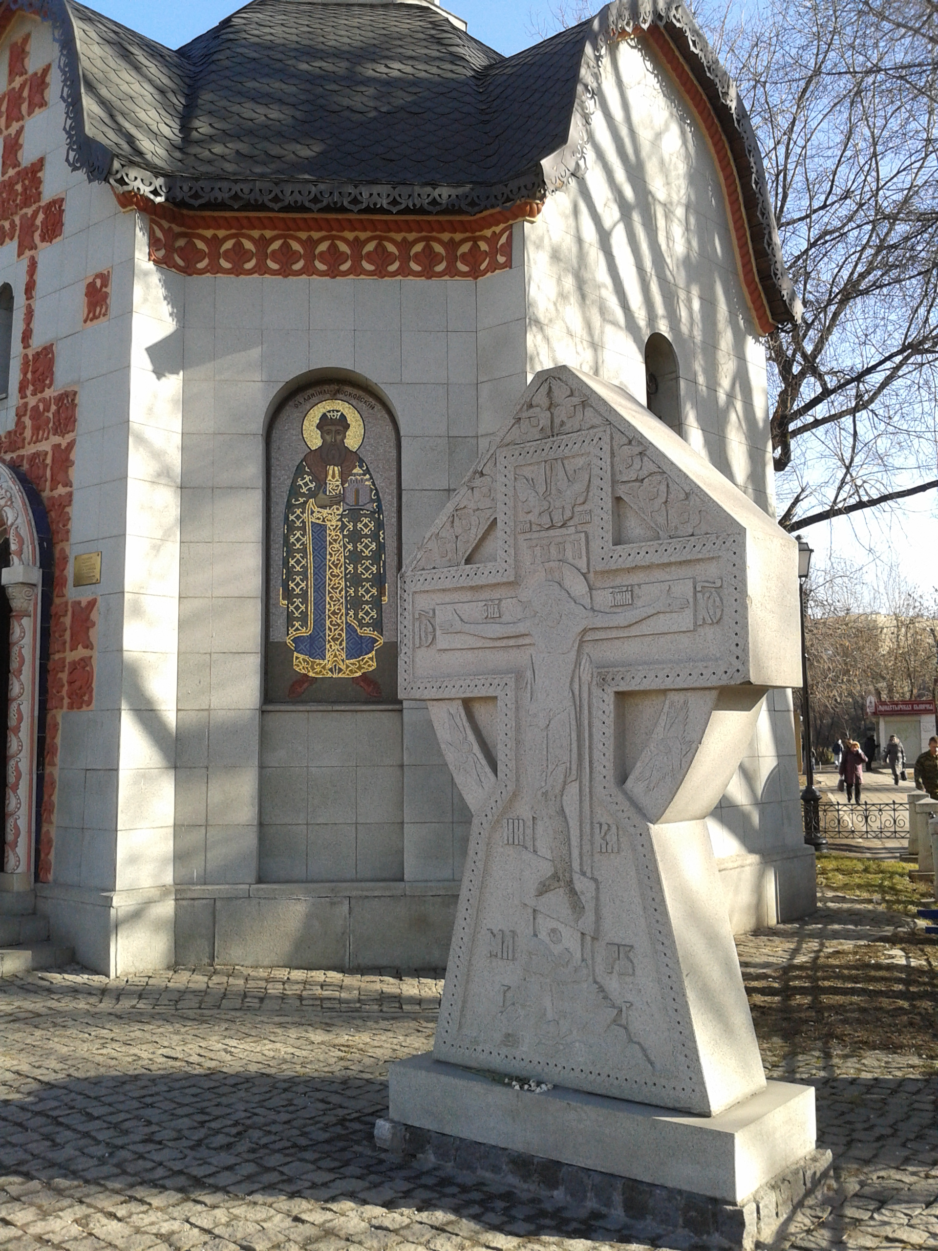 Памятный Крест у часовни св. Даниила Московского. Москва, станция метро "Тульская" (рядом с Даниловым монастырём)